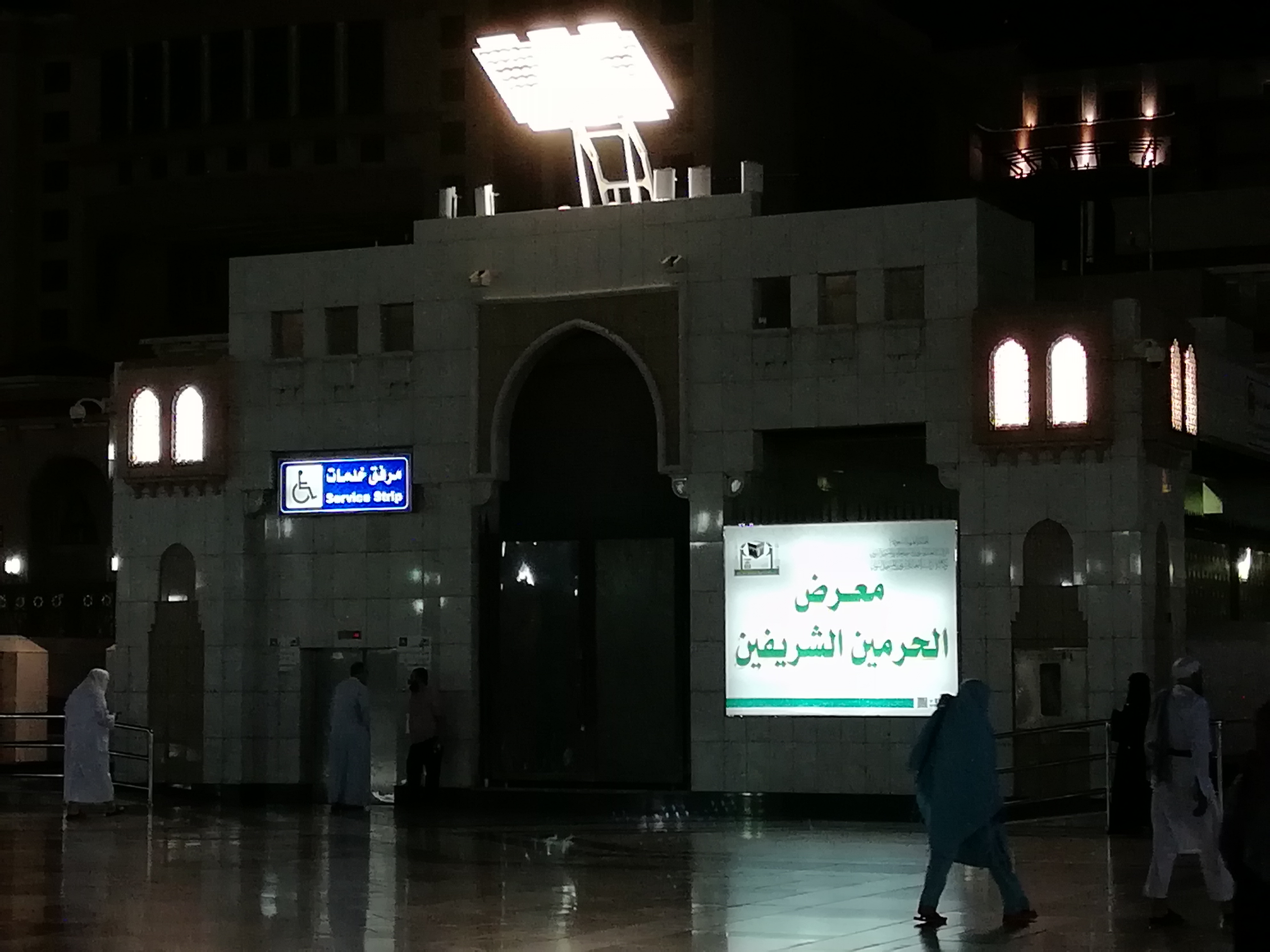 al-Madinah al-Munawarah Nabawi mosque al-Haramin al-Sharifeen show museum